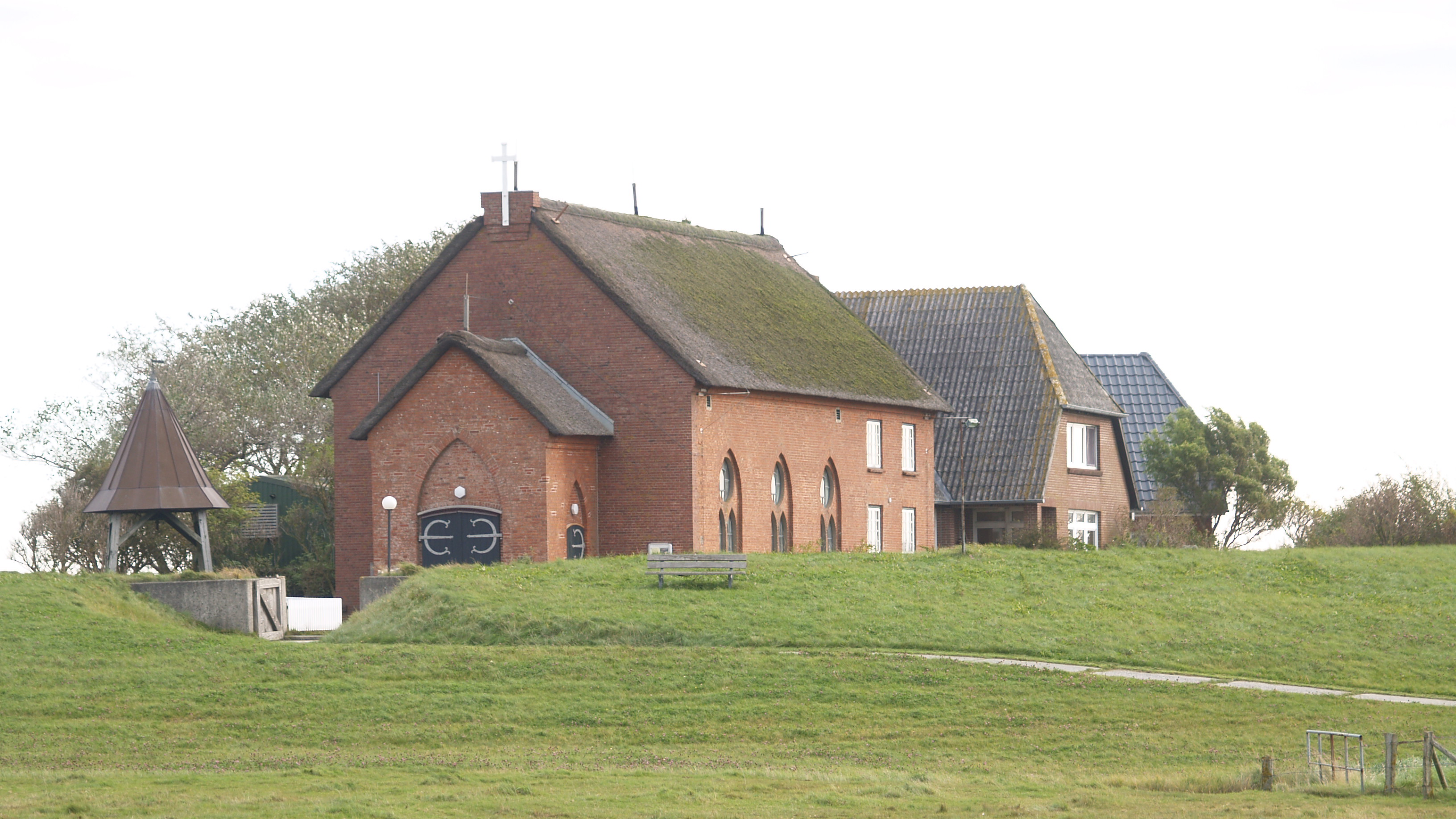 Kirche St. Petri auf der Kirchwarf in Langeneß.